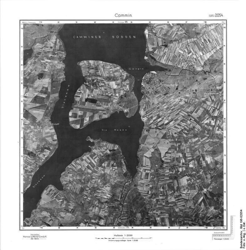 Cammin